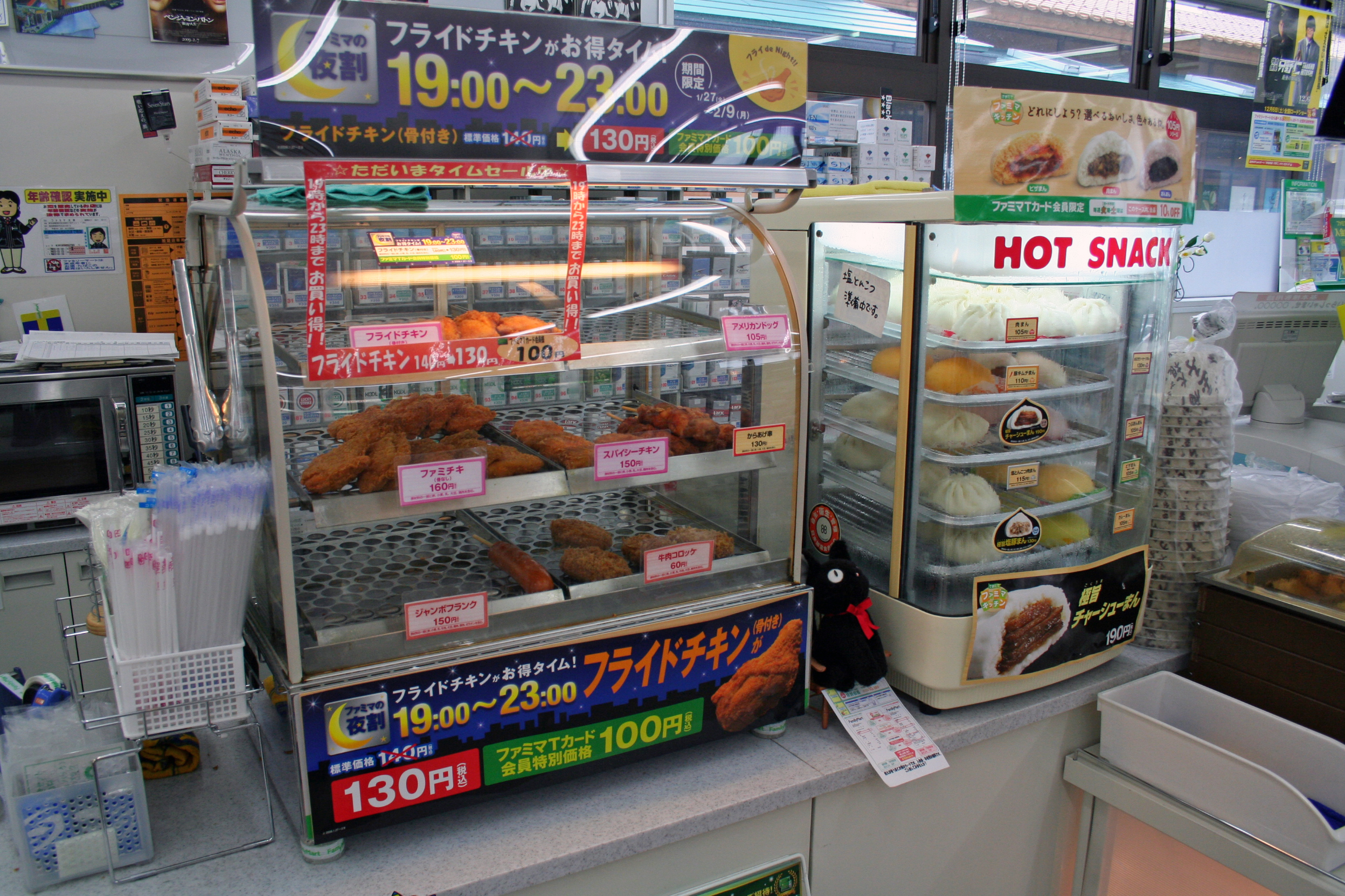 日本のコンビニエンスストアチェーンのファミリーマートの店頭で販売されているファーストフード。左側のケースにはフライドチキンやアメリカンドッグやコロッケなどが陳列されており、右側のケースには中華まんが陳列されている。